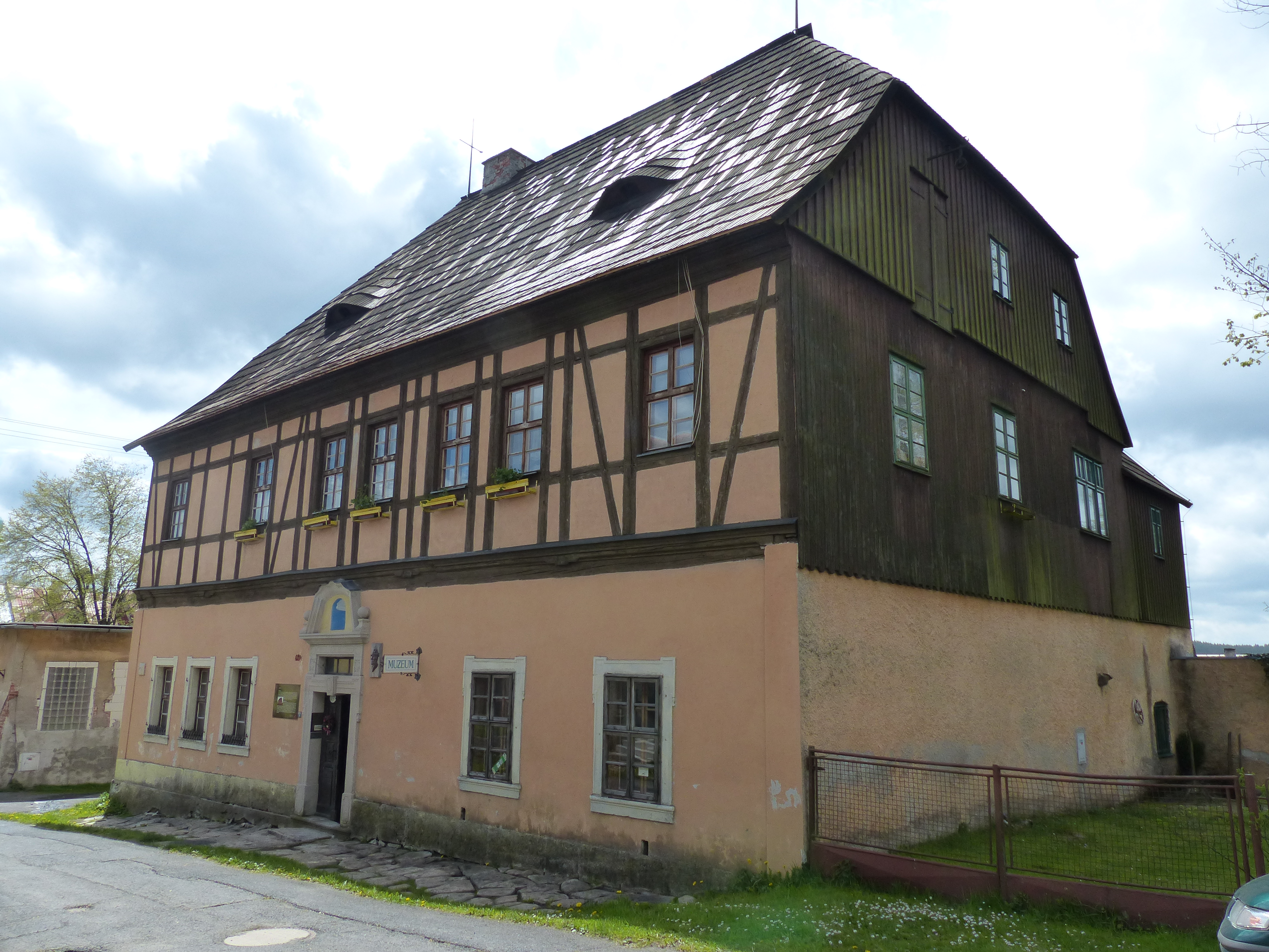 Ansicht von Horní Blatná